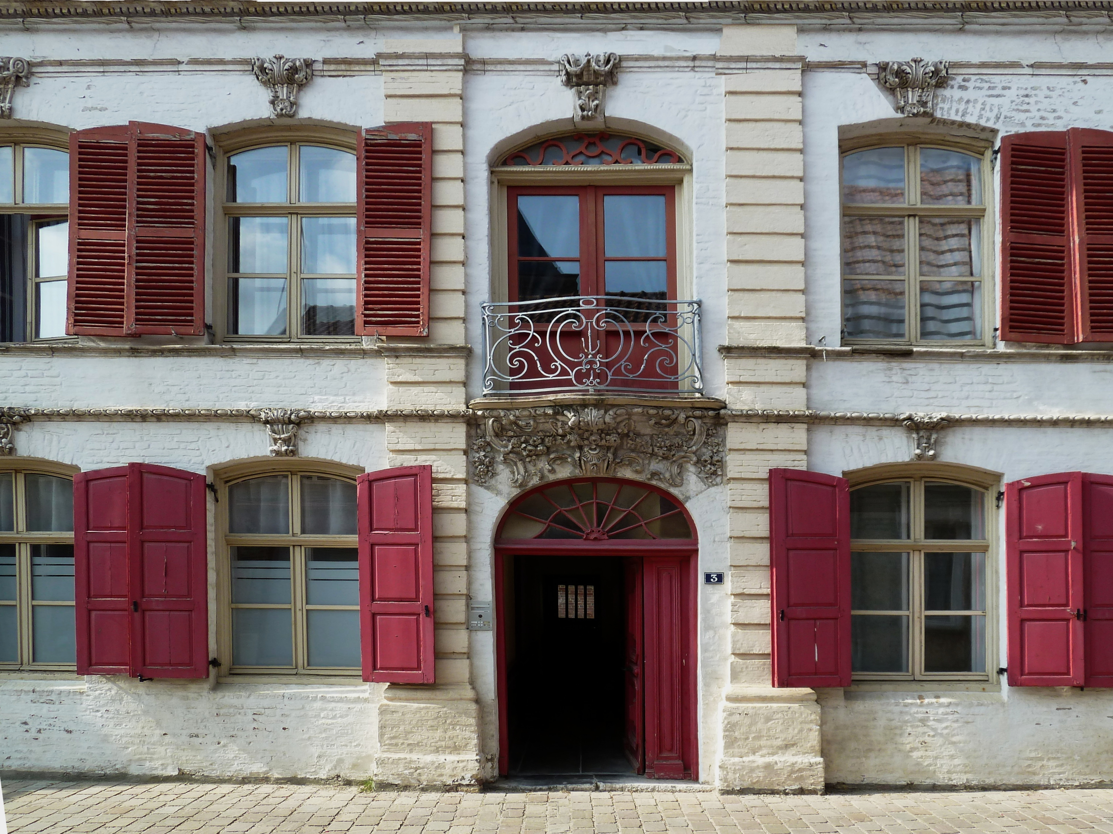 Maison du chevalier de Guernonval, 3 rue de Bergues Esquelbecq Nord.- France.